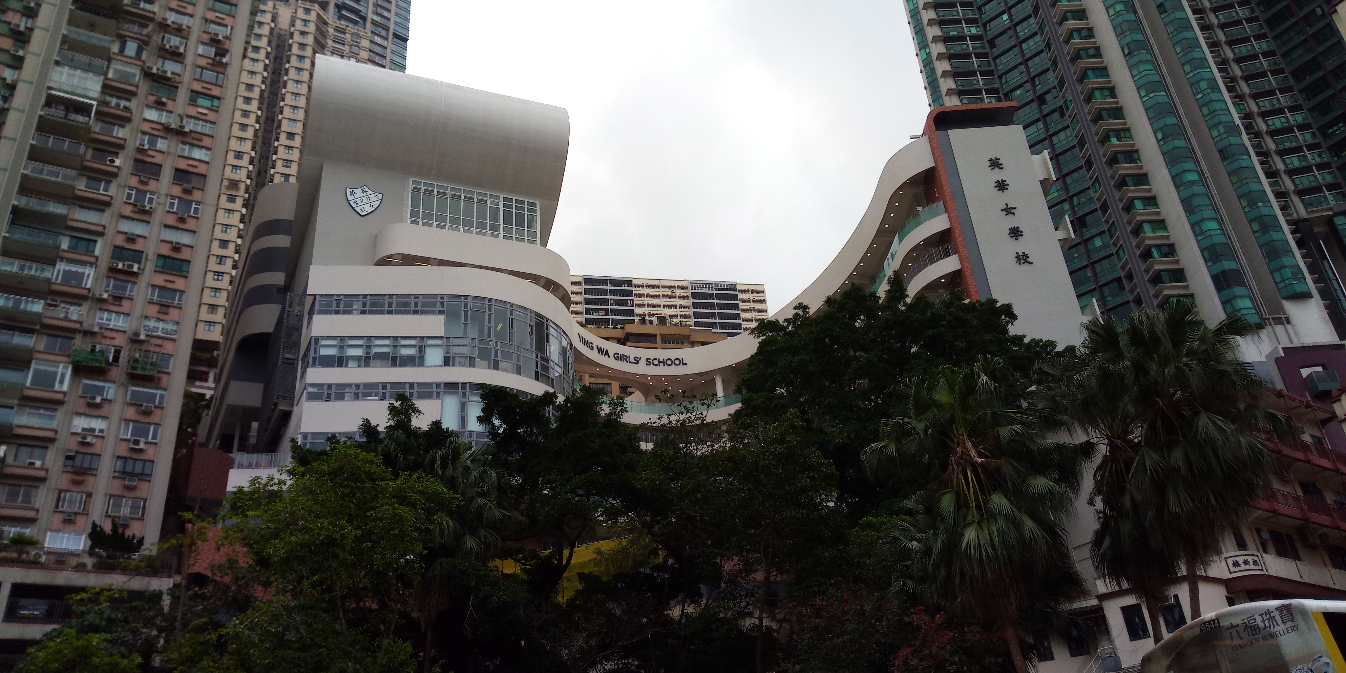 粵語: 由堅巷花園仰視嘅學校